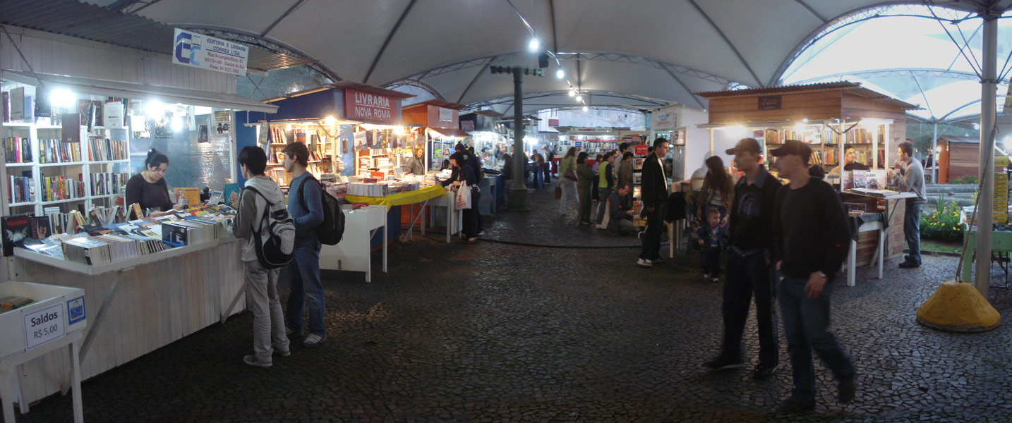 Feira do Livro de Caxias do Sul, 2010